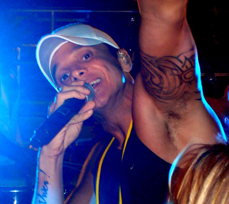 foto de show ao vivo de Netinho